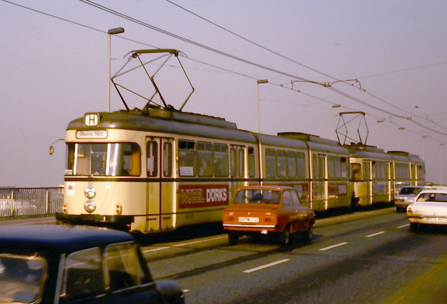 Düwag Triebwagen der Linie H auf der Kennedybücke in Bonn